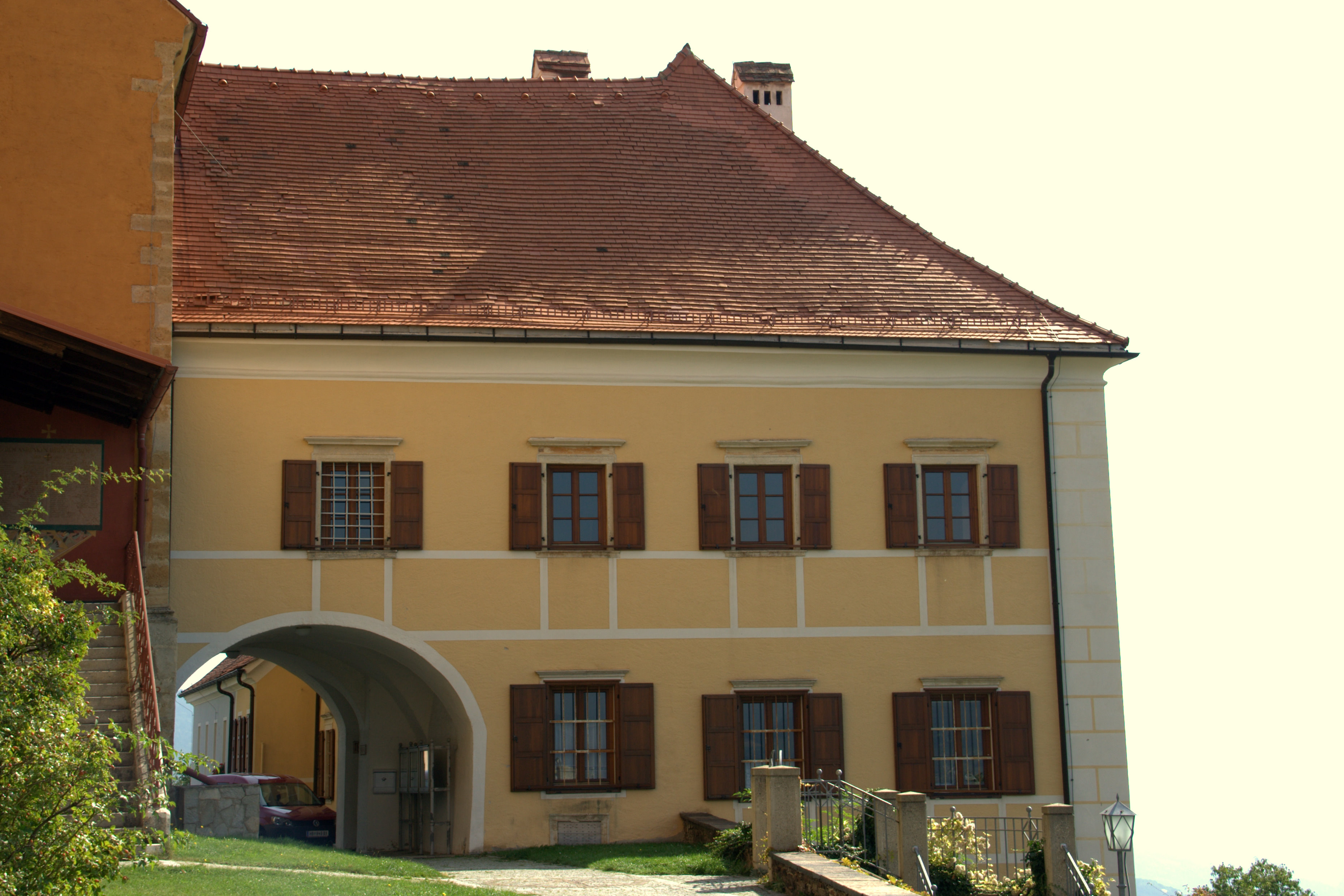 Pfarrhof